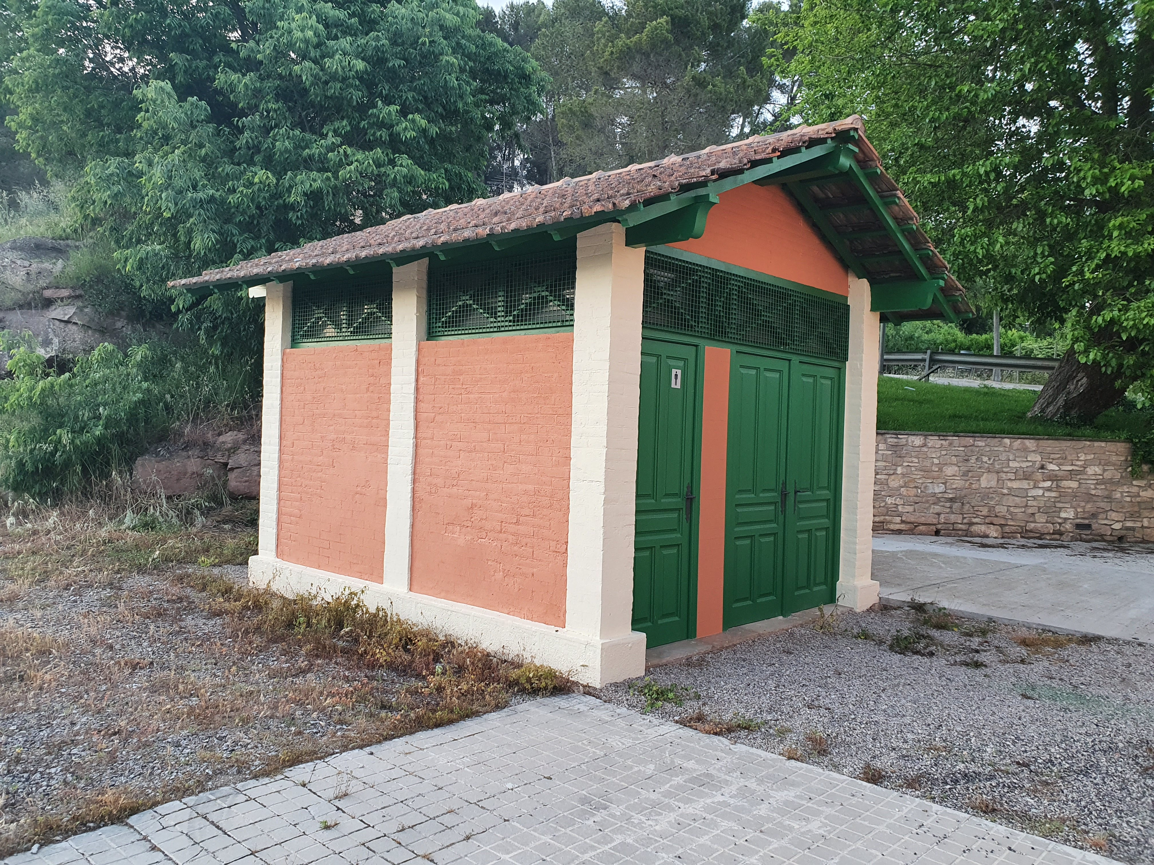 Estació de Rajadell